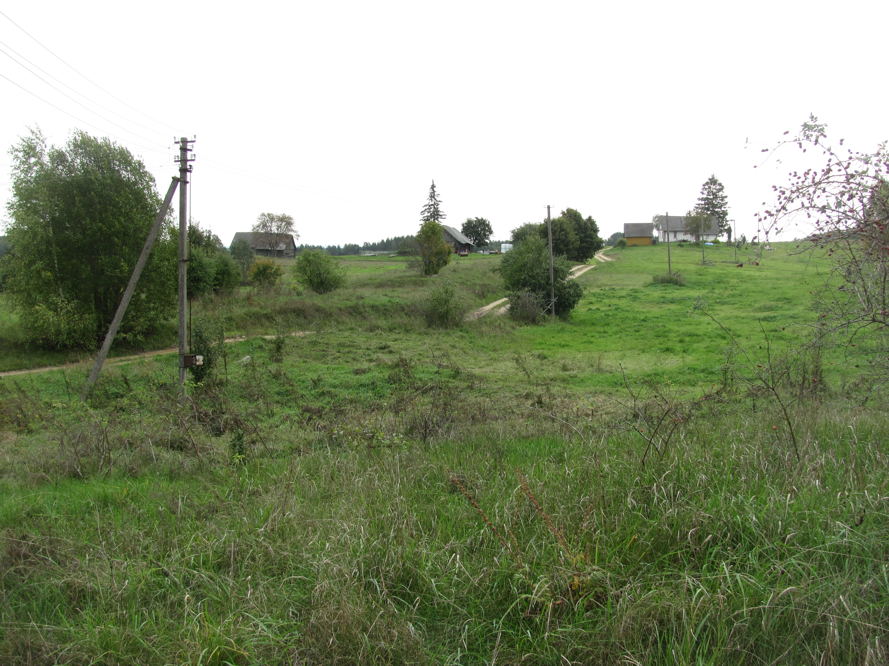 Šeimatis 28437, Lithuania